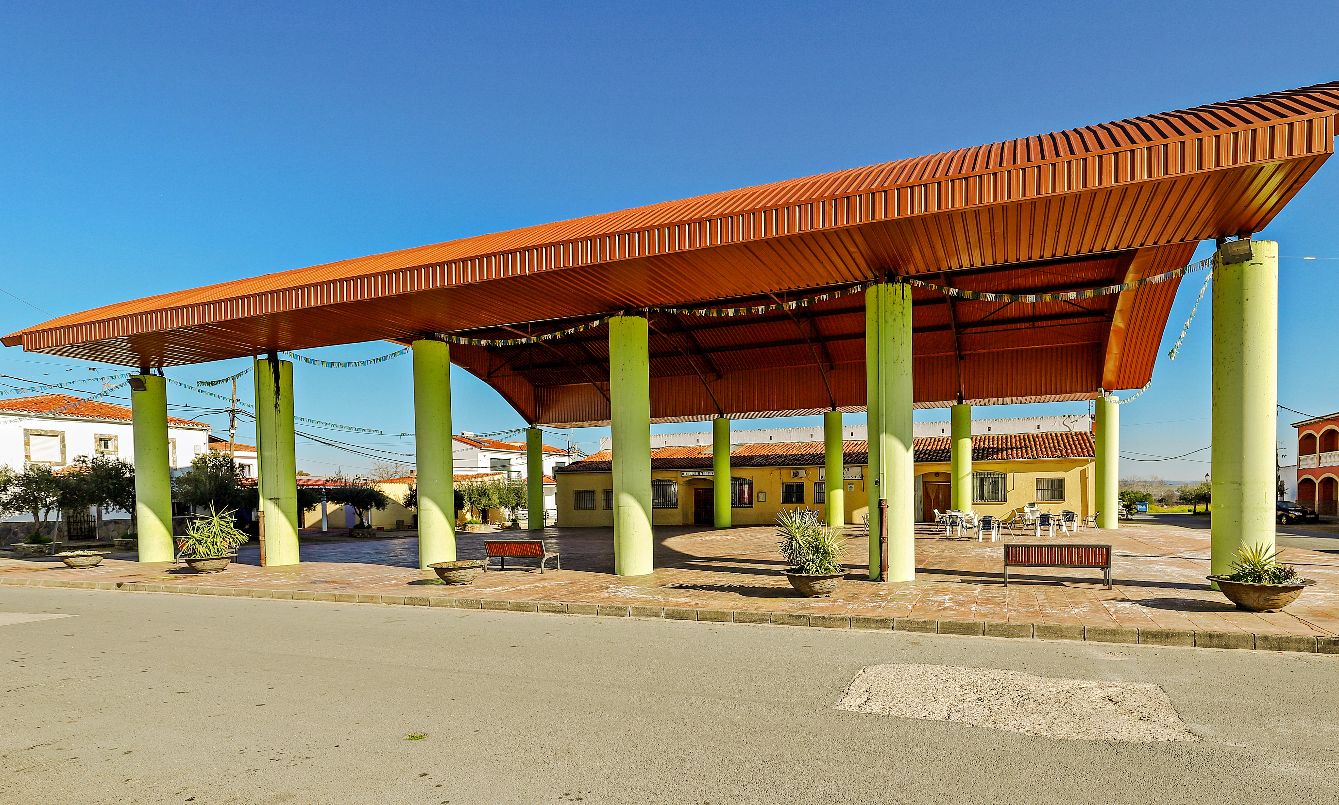 Alagón del Río municipio de la comarca de Vegas de Alagón, en la provincia de Cáceres